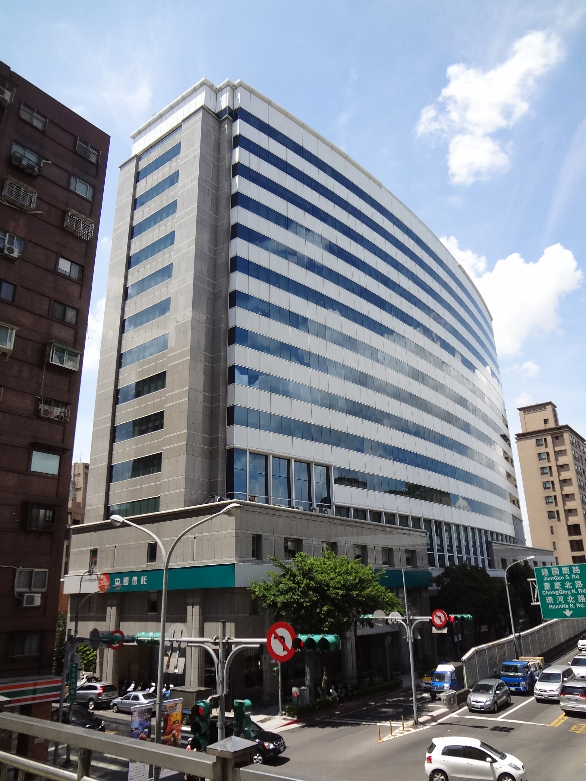 從臺北市信義區永吉路人行天橋上拍攝和信企業團位於永吉路的和信永吉大樓。